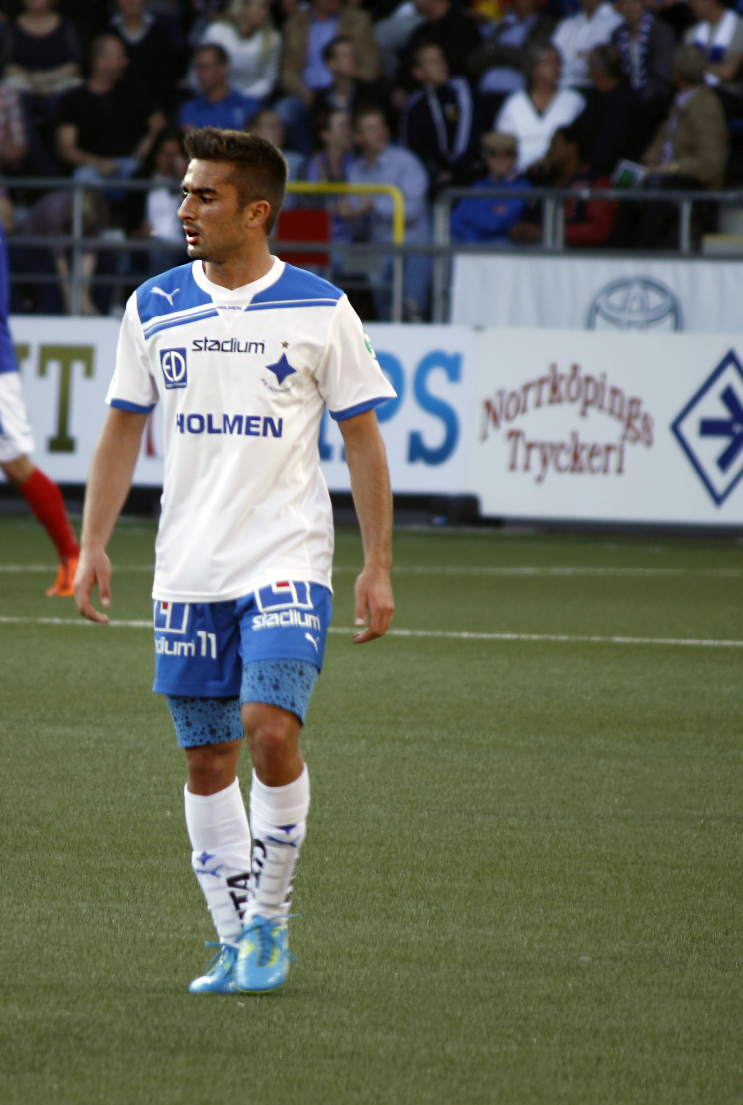 IFK Norrköpings mittfältare Christopher Telo